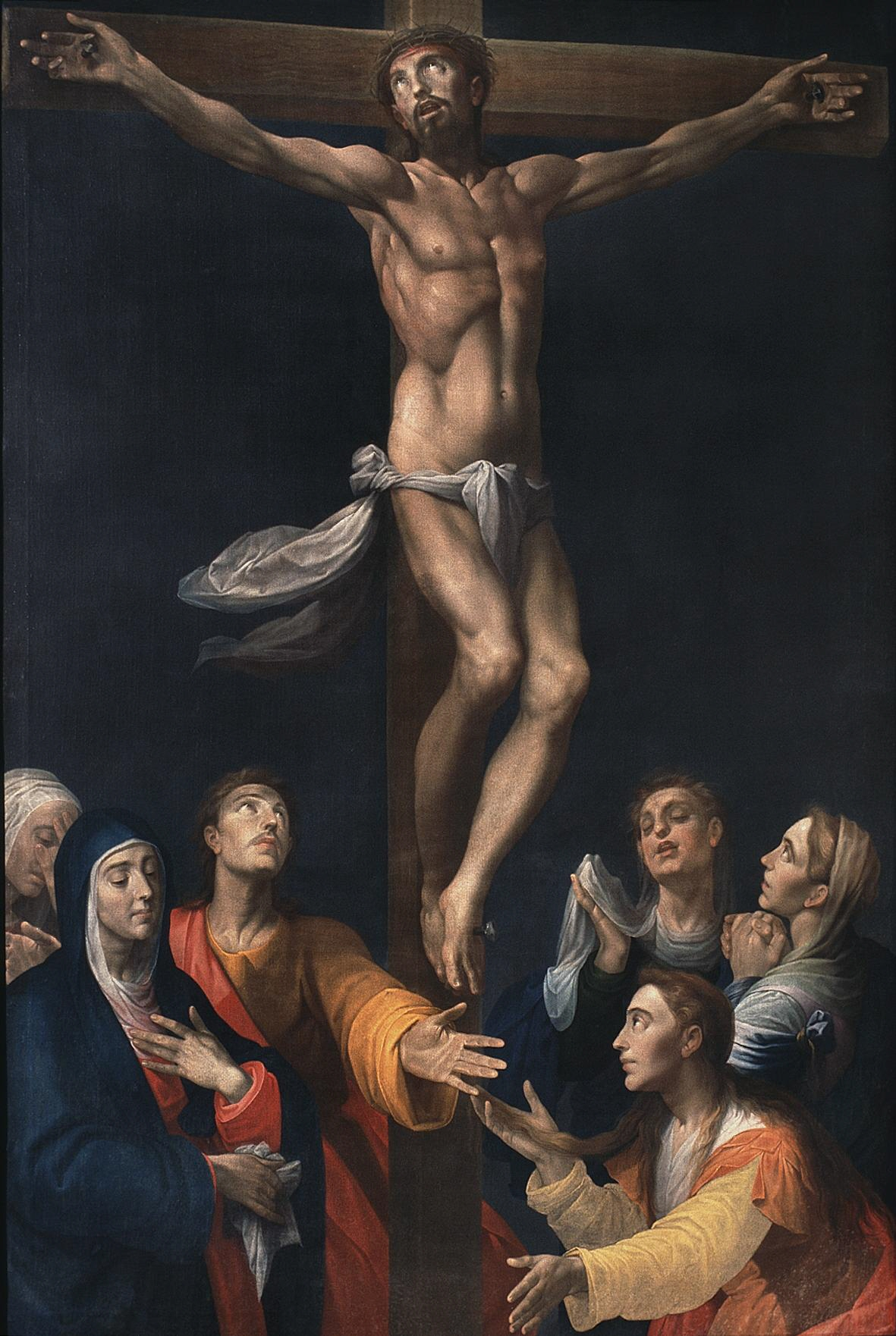 La obra muestra a Jesucristo crucificado en el Monte Calvario.